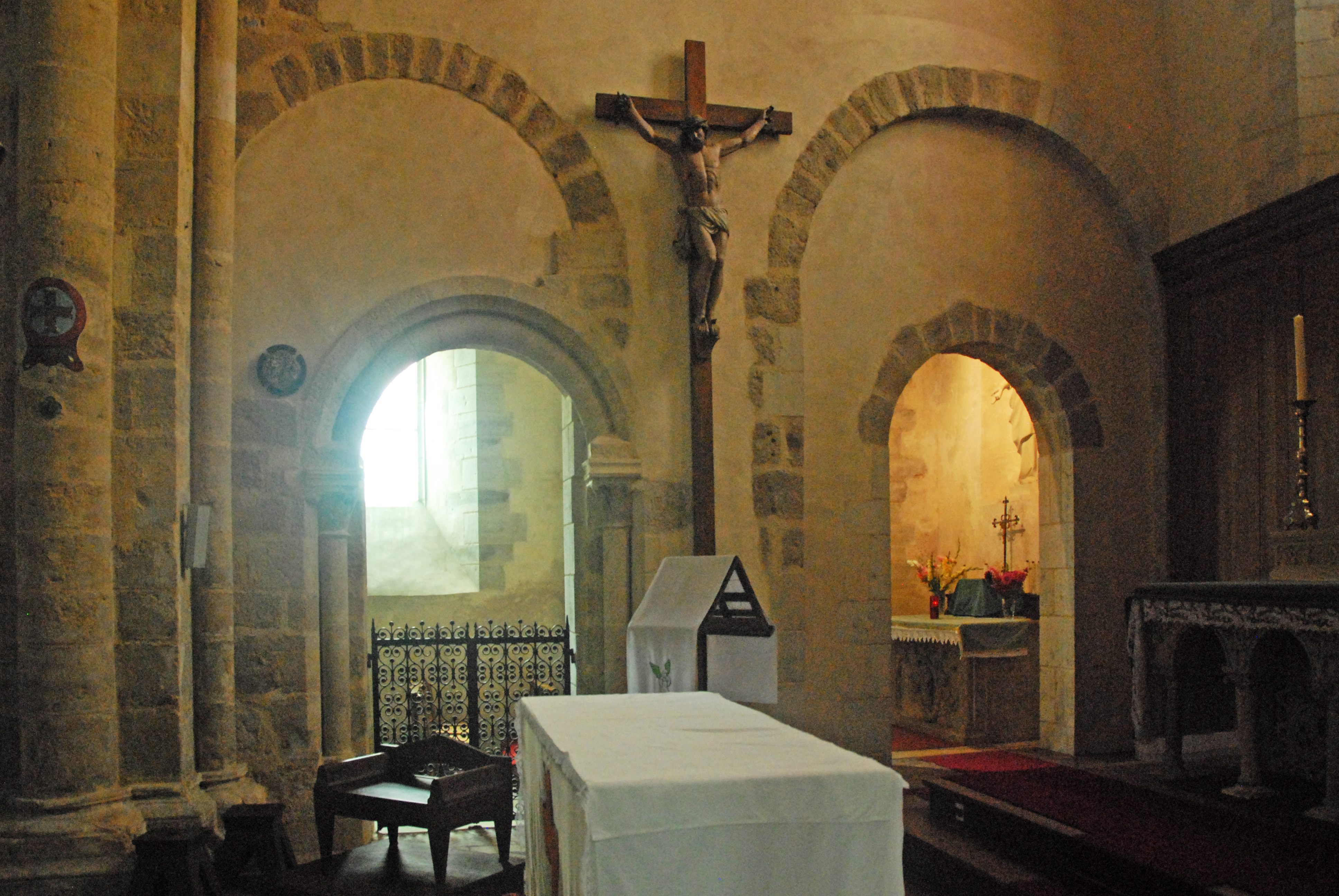 Neuvy_St.-Sépulcre, Basilika, Mittelschiff, NO-Wand, Chorjoch